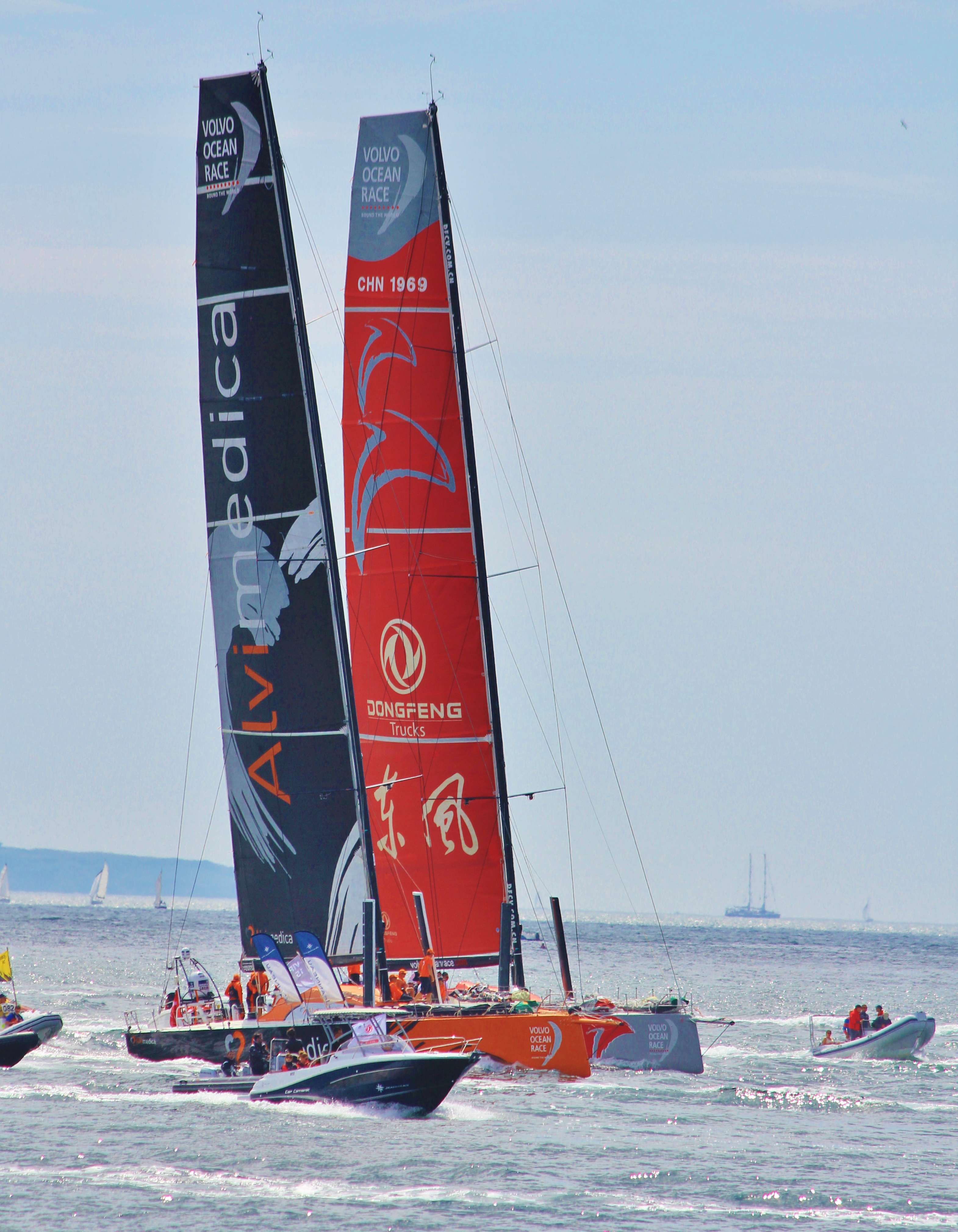 Course in-port de la Volvo Ocean Race à Lorient